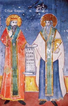 Чаниште, црква Св.Ѓорѓи, св. Кирил и св. Методија, северен ѕид